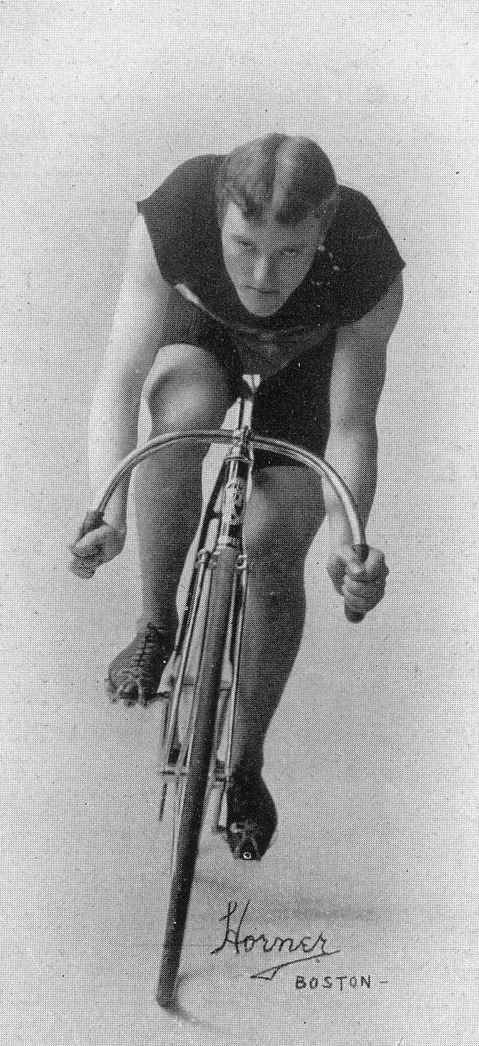 Frank Kramer, US-amerikanischer Radrennfahrer